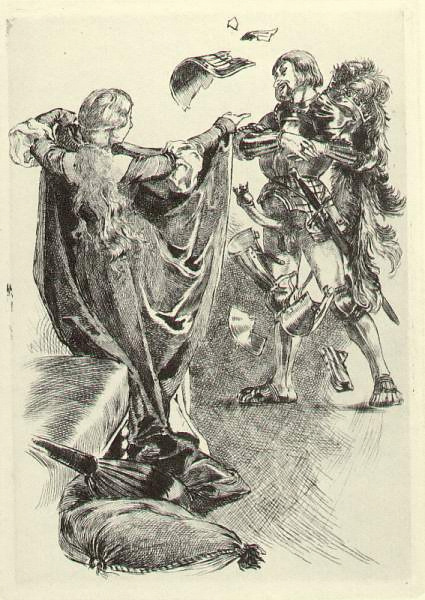 Dessins de Martin van Maele. Illustration de La Grande Danse macabre des vifs, 1905.